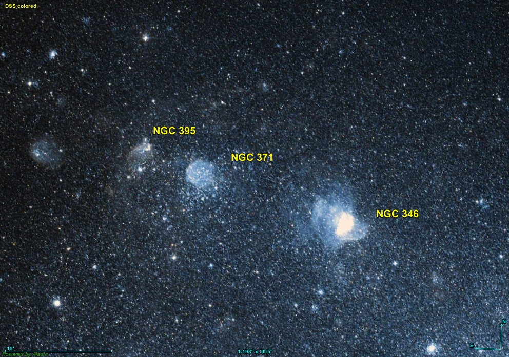 Image créée à l'aide du logiciel Aladin Sky Atlas du Centre de Données astronomiques de Strasbourg et des données de DSS (Digitized Sky Survey).